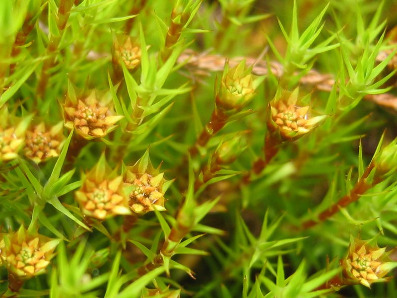 Steifblättriges Widertonmoos (Polytrichum strictum), Zingst, männliche Pflänzchen mit gipfeligen Antheridienständen